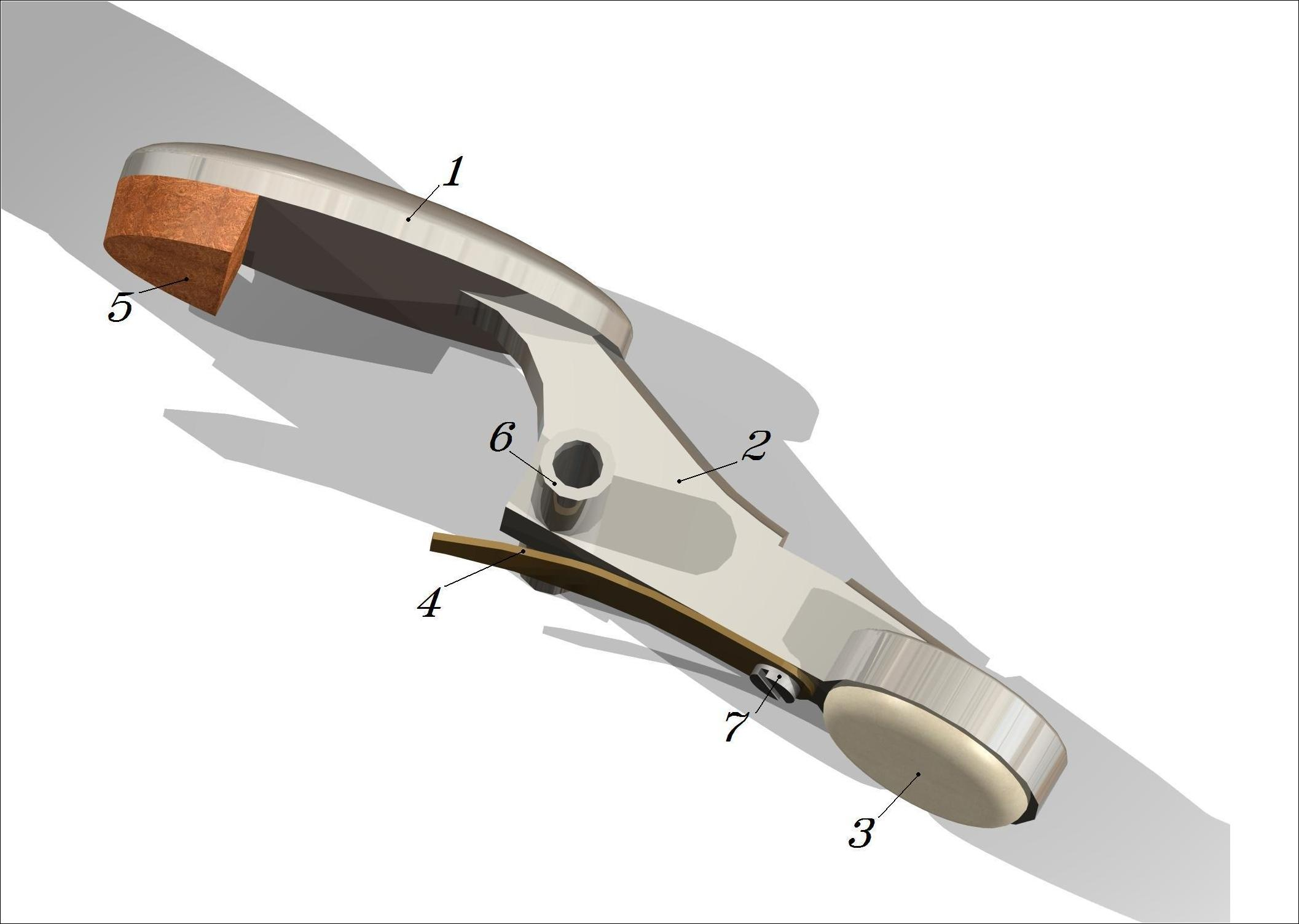 image de synthèse de la clef de la medium d'une clarinette